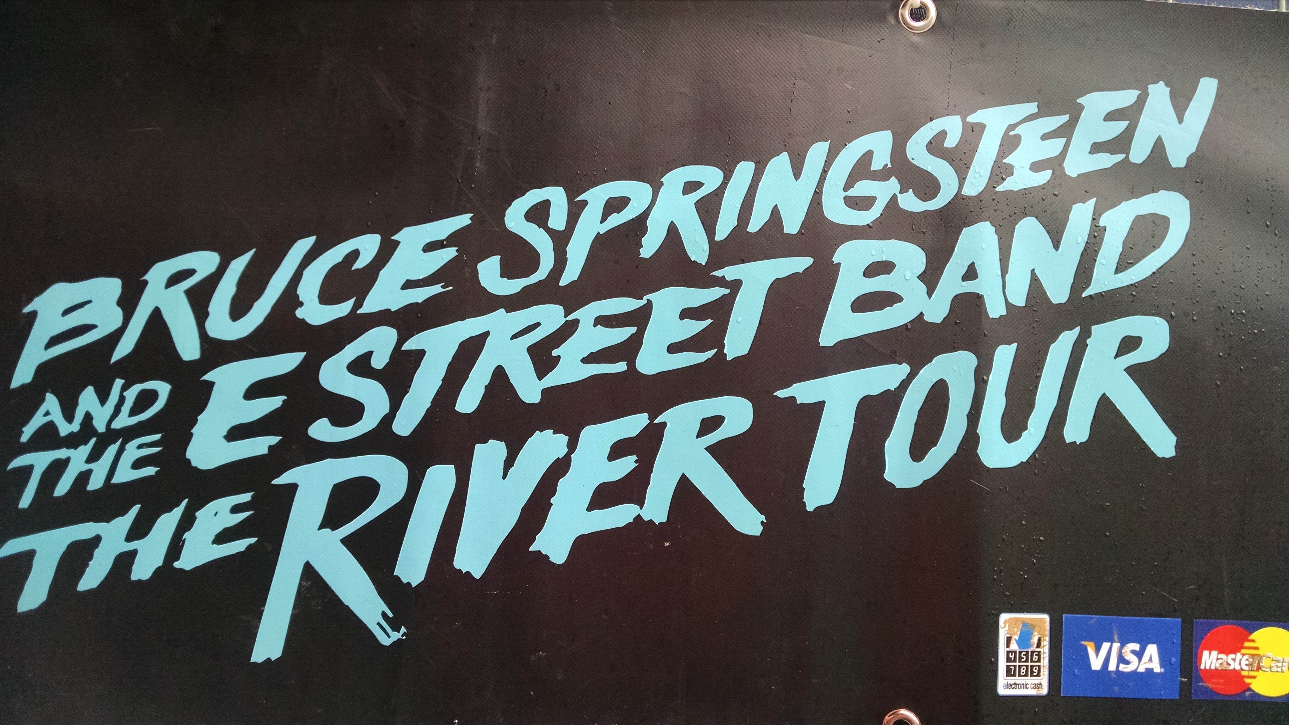 The River Tour 2016. Weltweit wurden in 2016 ca. 75 Konzerte gespielt